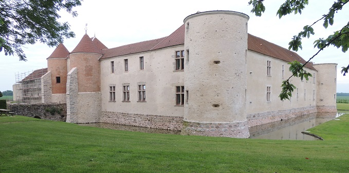 Château de Launoy-Renault, 2 tours rondes sans toit, sur la face ouest à droite devant les douves et à gauche les tours rondes rouges à toit et renforts du chatelet d'entrée côté Nord derrière le pont dormant d'accès avec les pelouses au delà des douves en eaux